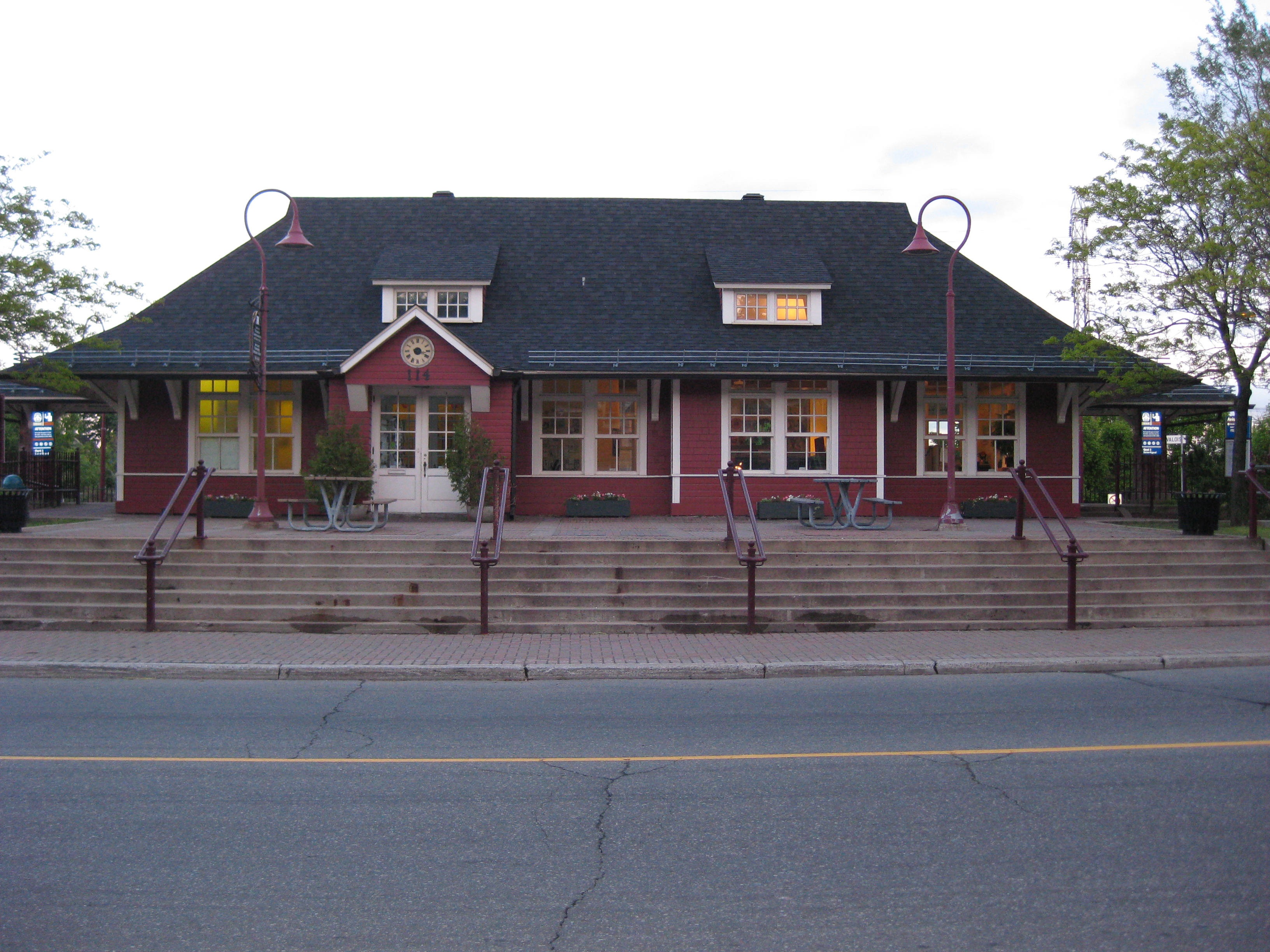 Vue frontale de l'édifice de la gare Valois. Ligne Dorion-Rigaud de l'AMT